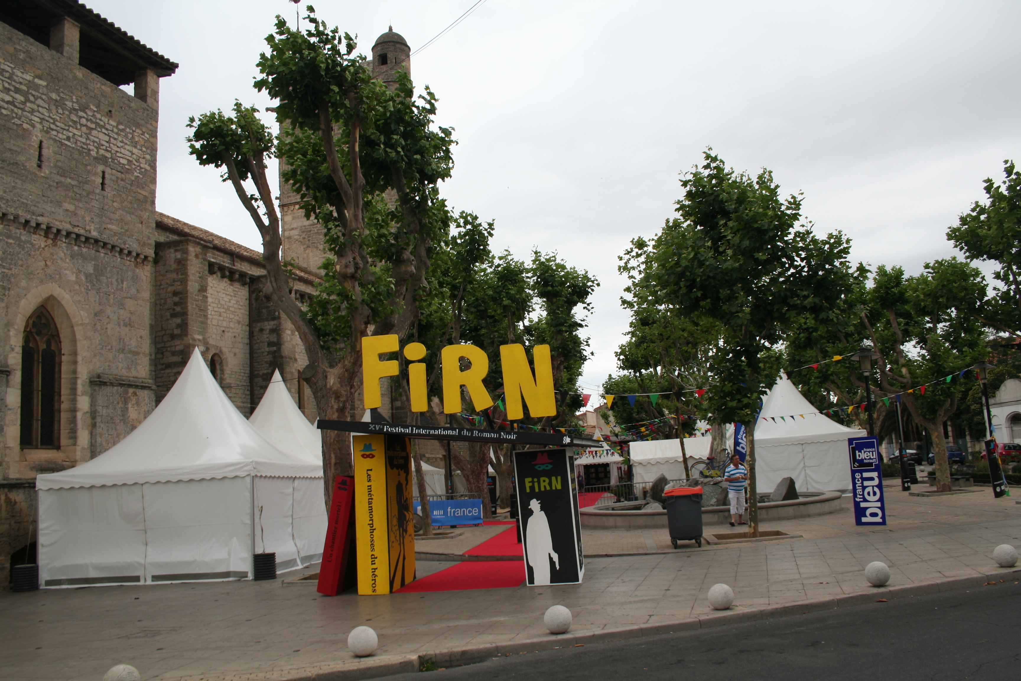 Frontignan (Hérault) - FIRN 2012 (Festival International du Roman Noir 2012).